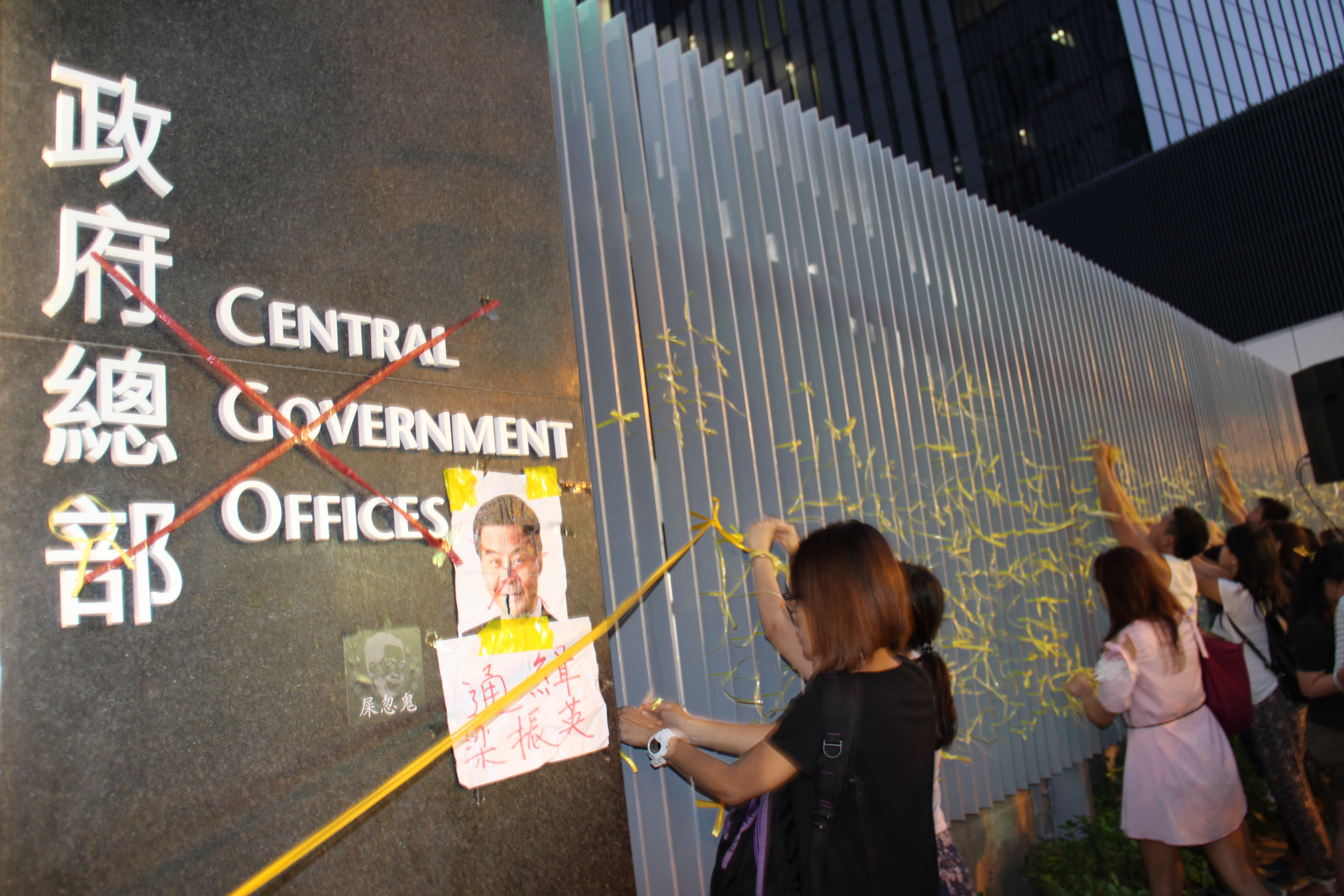 中文（台灣）: 學生和市民在政總東側公民廣場鐵柵欄上係黃絲帶表真普選訴求